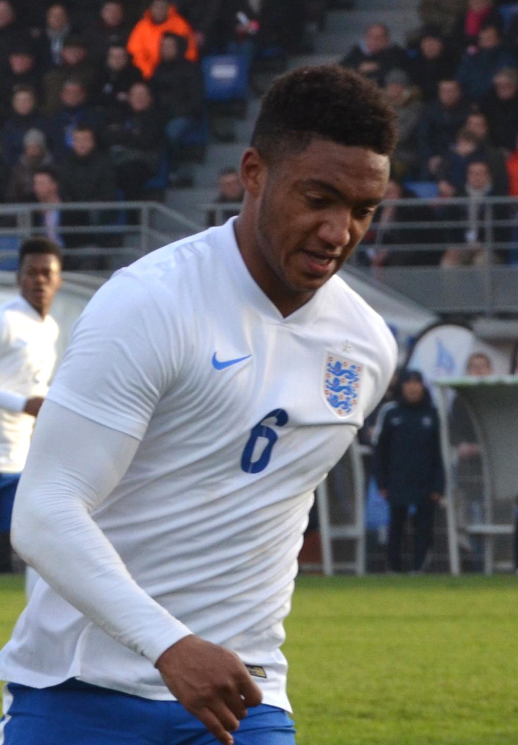 Photographie prise lors du match opposant la France à l'Angleterre pour les qualifications du championnat d'Europe de football des moins de 19 ans 2015 au stade Louis-Villemer de Saint-Lô le 31 mars 2015. Ici, Joseph Gomez.